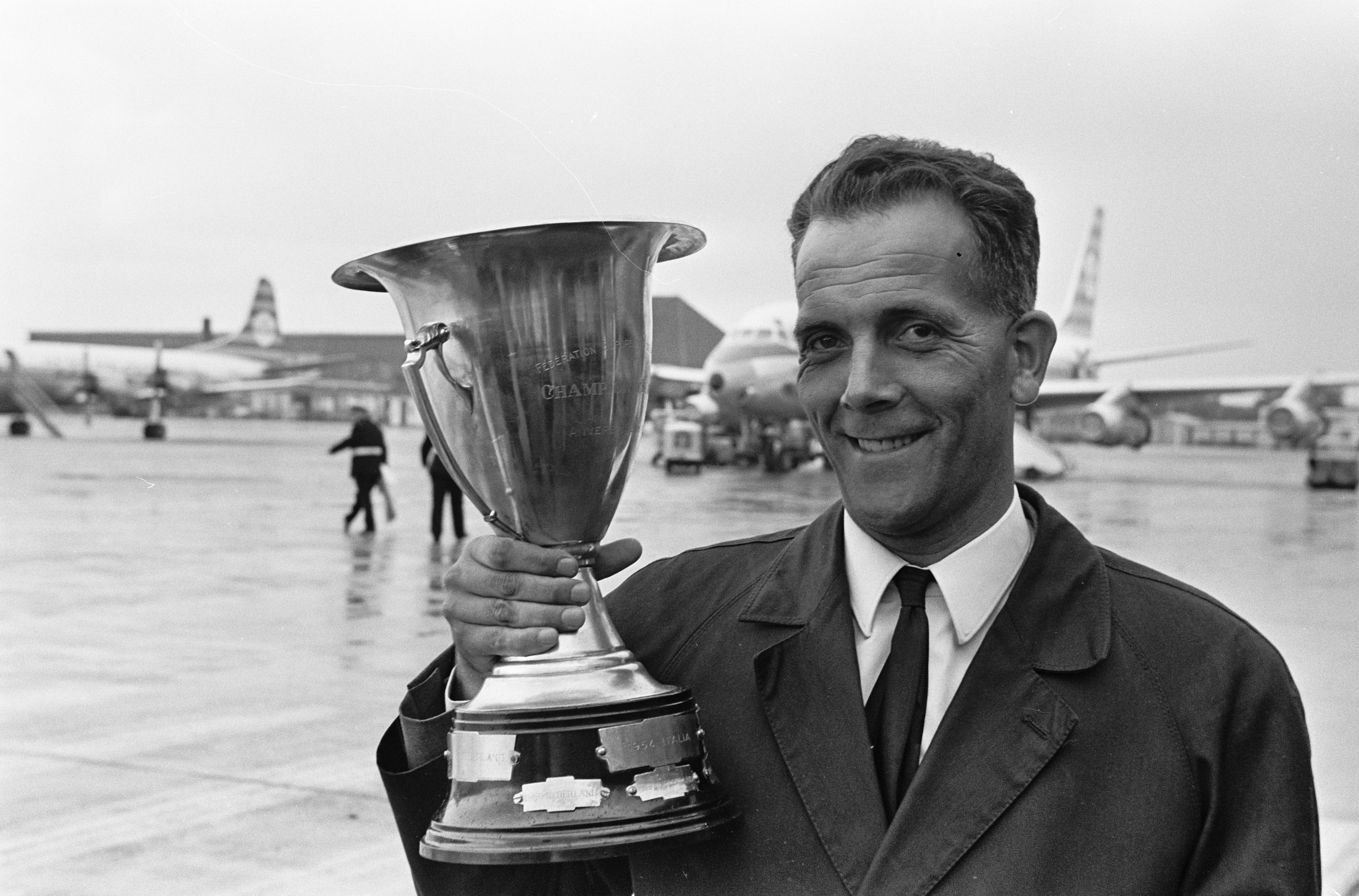 Collectie / Archief : Fotocollectie Anefo Reportage / Serie : [ onbekend ] Beschrijving : Nederlands honkbalteam terug, Hannie Urbanus met beker Datum : 6 september 1965 Trefwoorden : bekers, honkbal, teams Fotograaf : Evers, Joost / Anefo Auteursrechthebbende : Nationaal Archief Materiaalsoort : Negatief (zwart/wit) Nummer archiefinventaris : bekijk toegang 2.24.01.05 Bestanddeelnummer : 918-1463